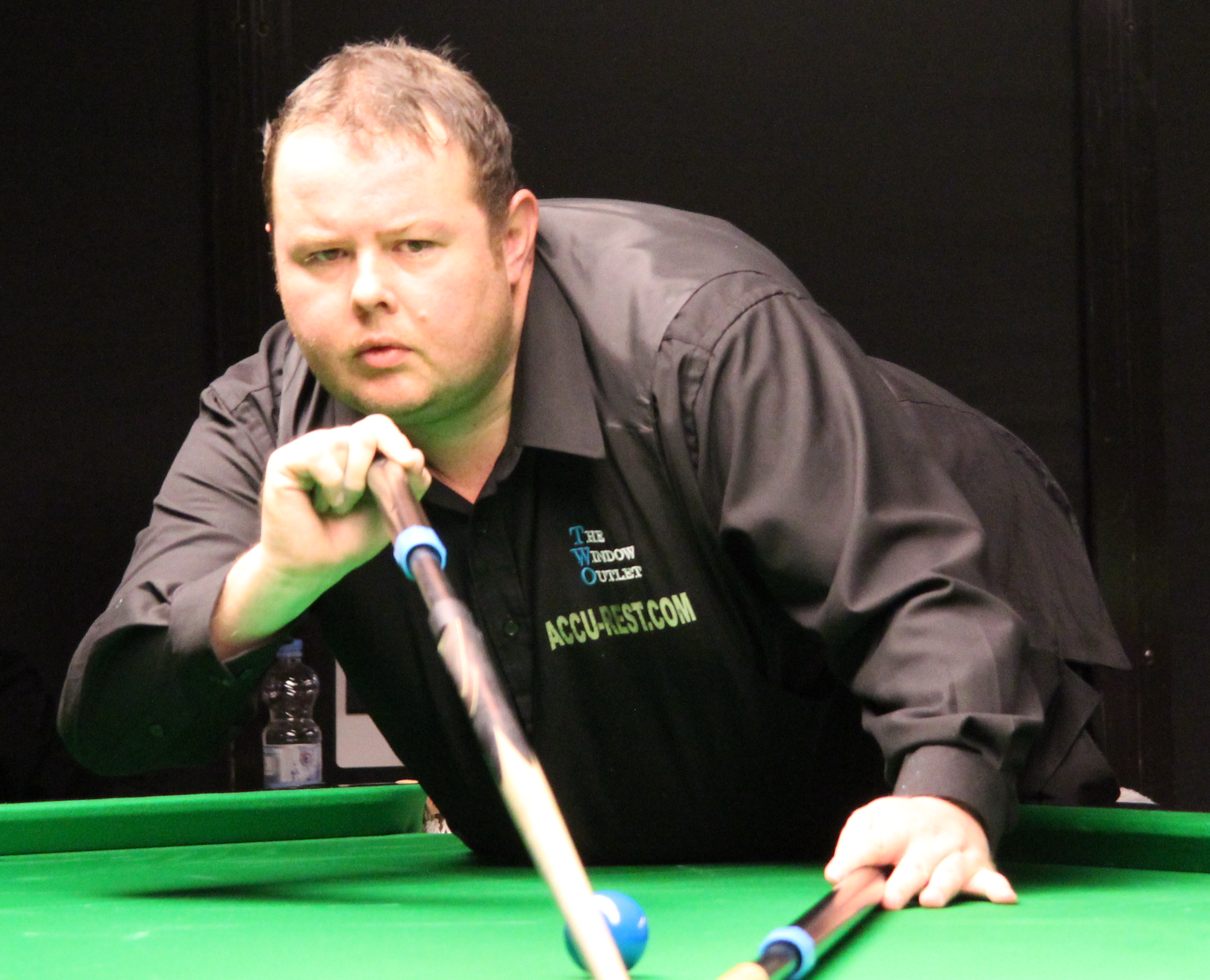 Stephen Lee beim Paul Hunter Classic 2011